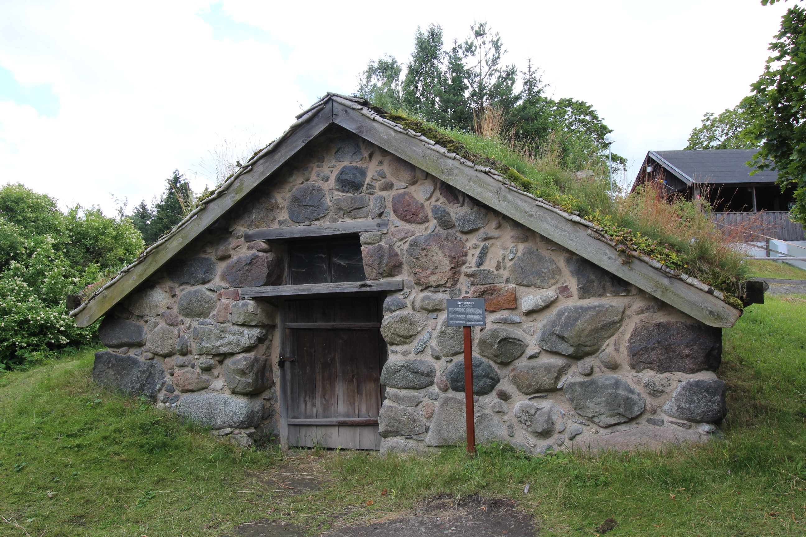 Stenstugan, uppförd på plats till Skansens öppnande 1891